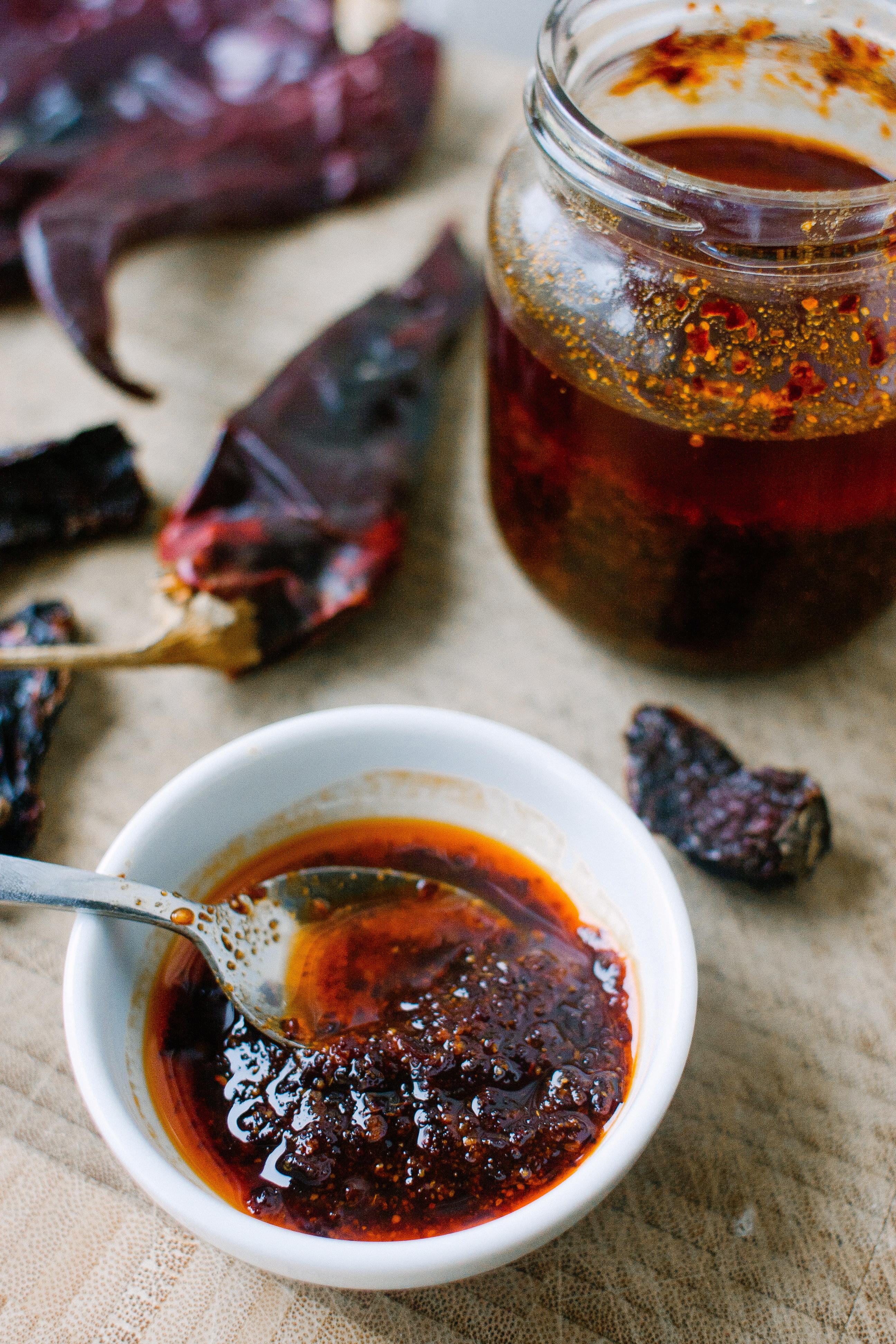 Salsa macha hecha de chiles guajillo y chipotle